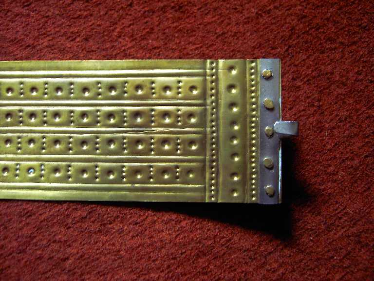 Rückseite einer Gürtelblech-Replik nach dem Grab 11 von Hirschlanden, hergestellt von Stefan Jaroschinski